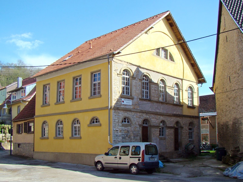 Alte Synagoge in Sinsheim-Rohrbach